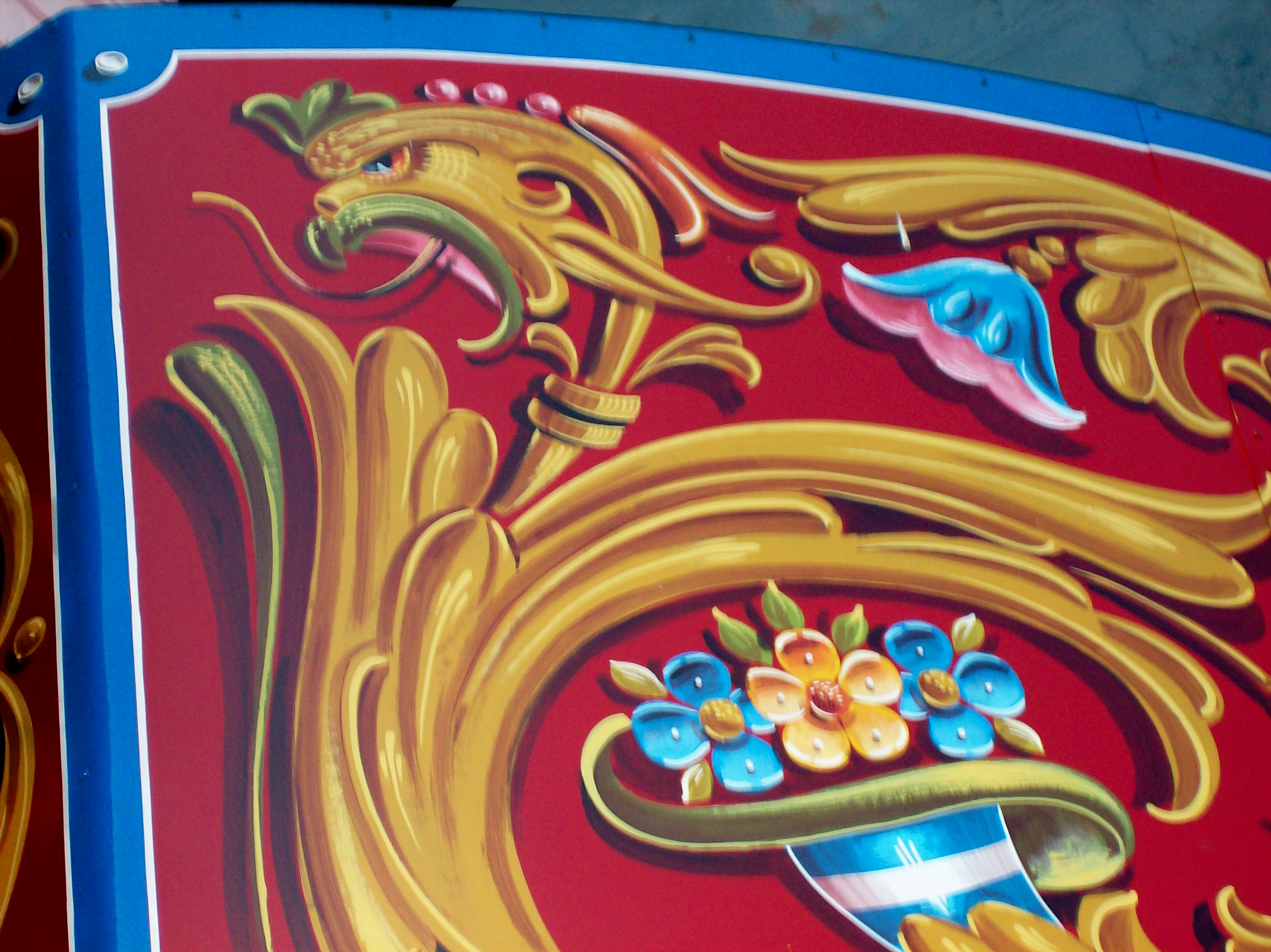 FILETEADO PORTEÑO: Buenos Aires, Dragón.